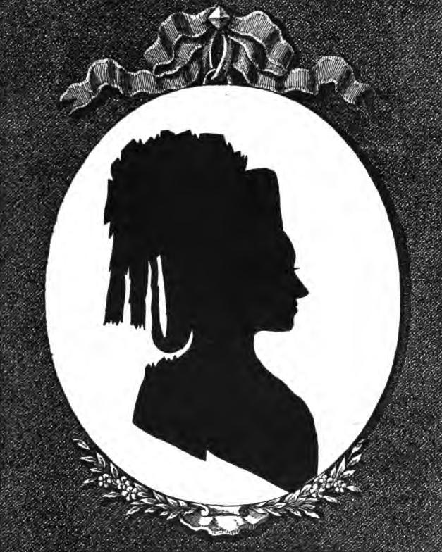 Прасковья Кирилловна Разумовская (1755—1808), фрейлина, замуж за генерал-фельдмаршалом И.В.Гудовичем (1741—1820).